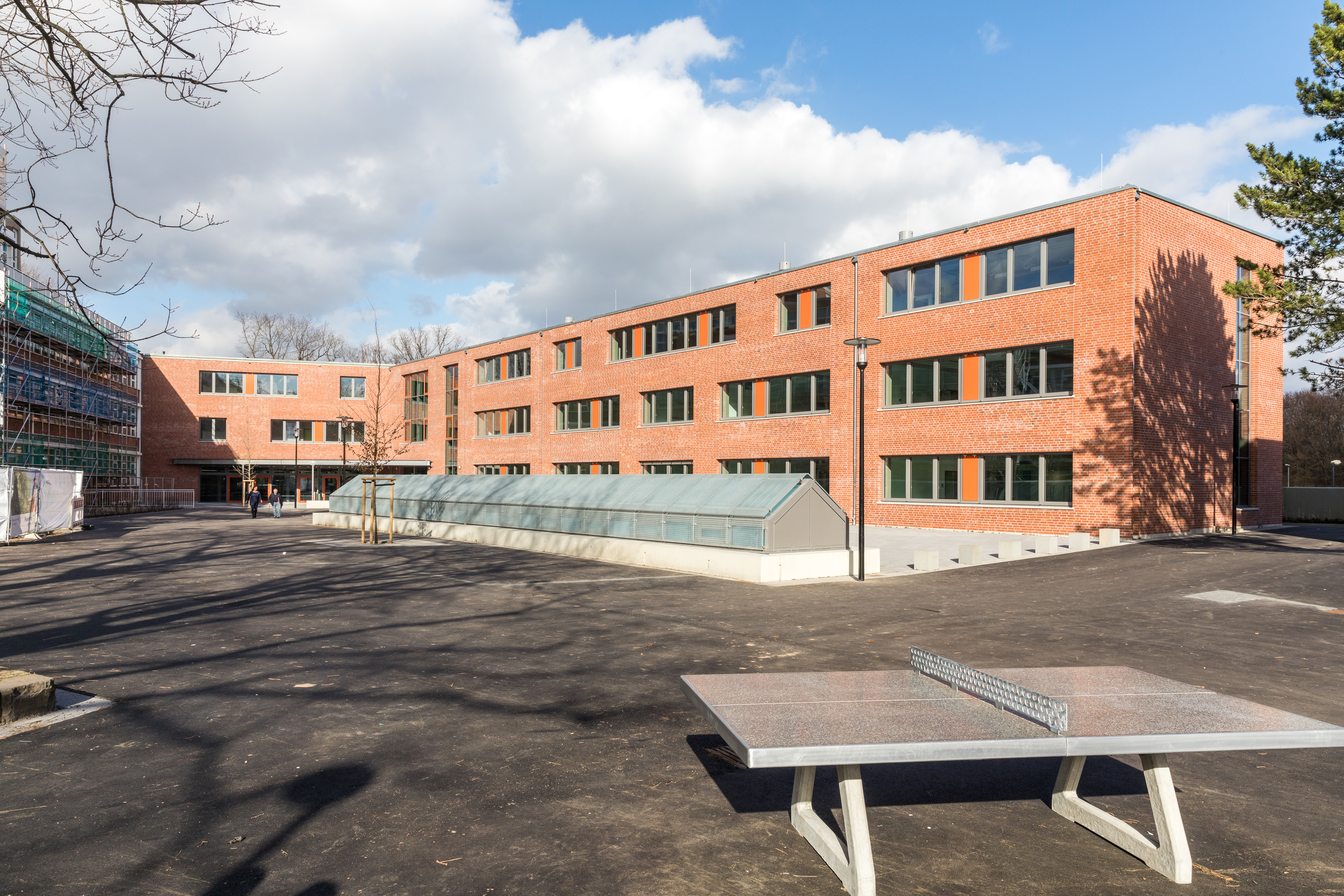 Erweiterungsbau Albertus-Magnus-Gymnasium Köln